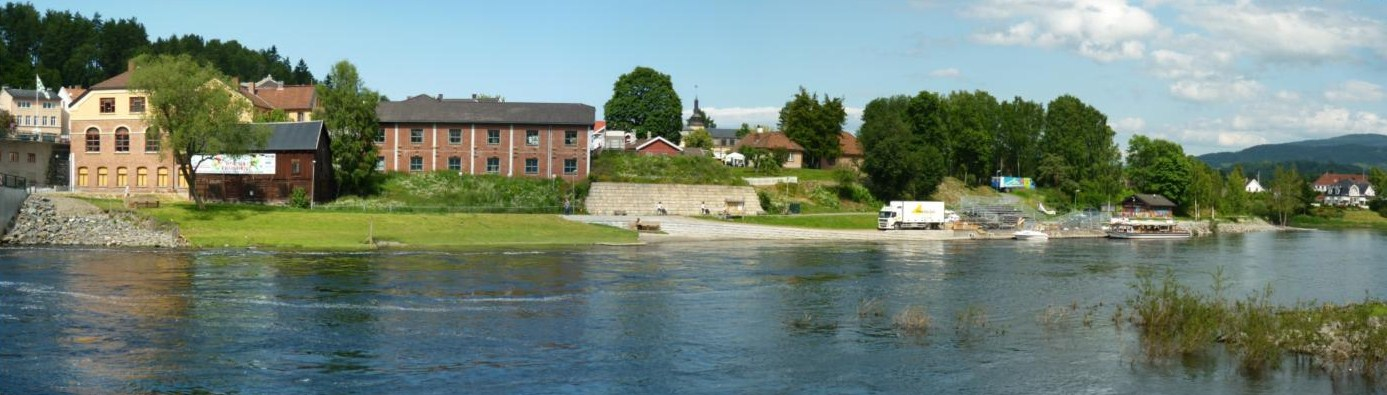 Glatved Brygge innunder Hønefossen i Hønefoss